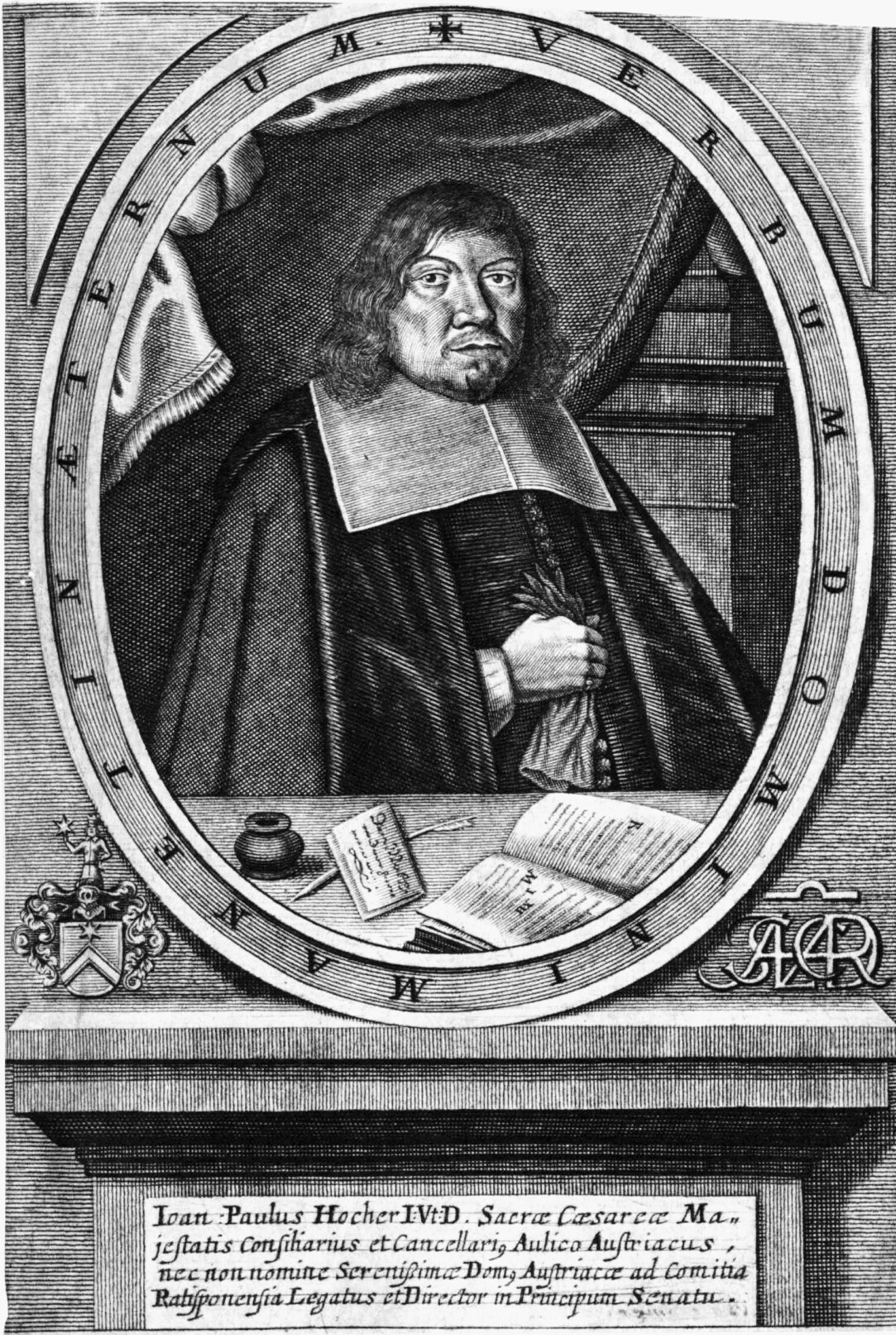 Johann Paul Hocher (1616-1683), Kanzler Kaiser Leopolds I., 1660 Tiroler Adel, 1667 Reichsfreiherrenstand